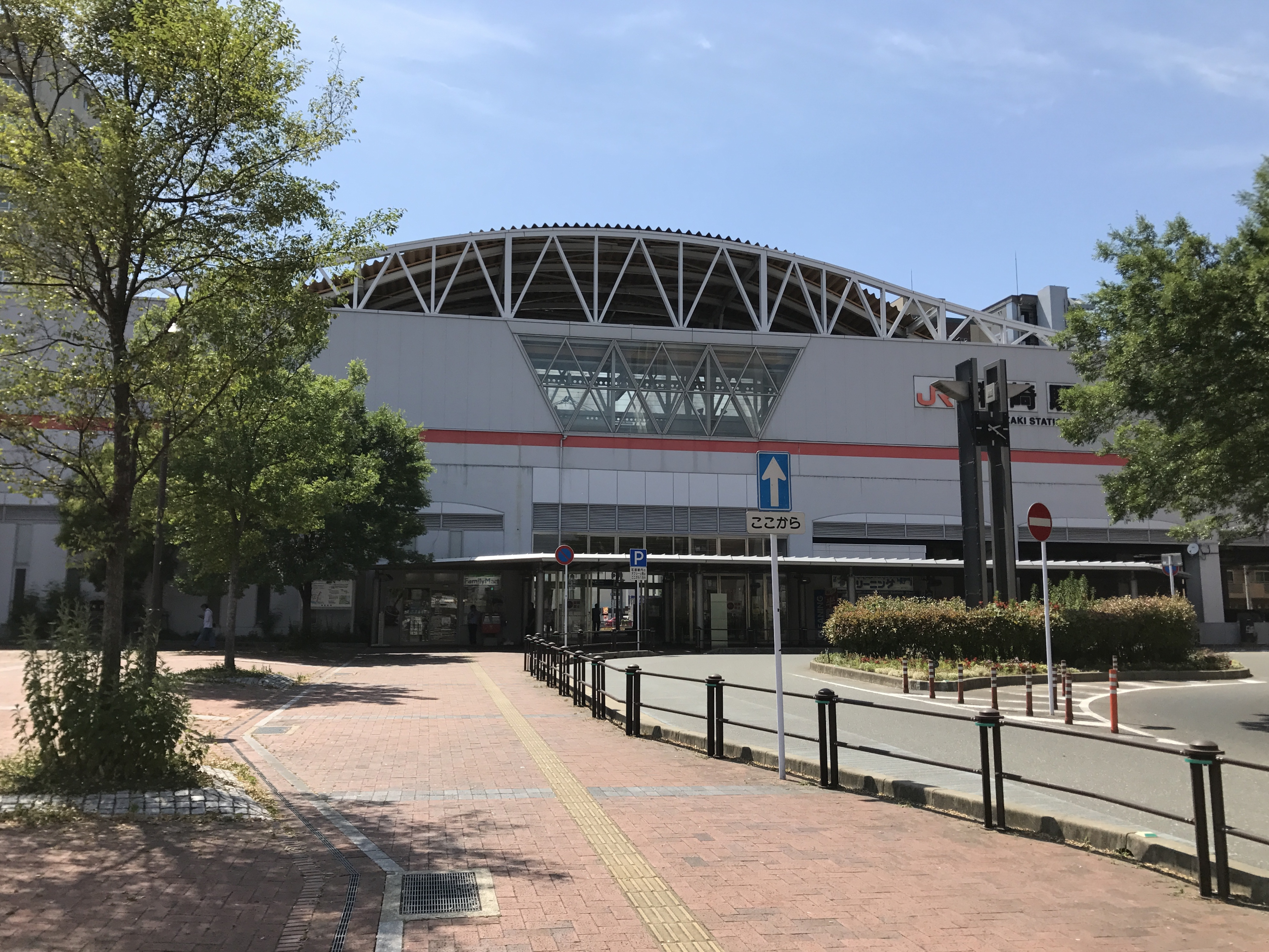 箱崎駅東口